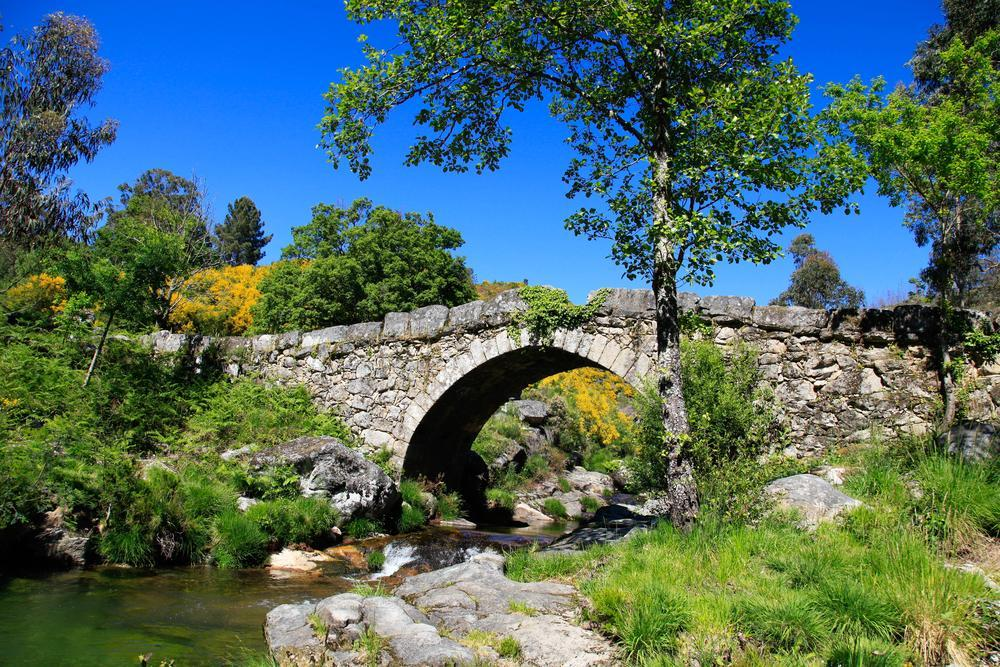 Ponte Romana sobre o Rio Ave., constituída por um único arco, com guardas e com um aspeto sem manutenção.